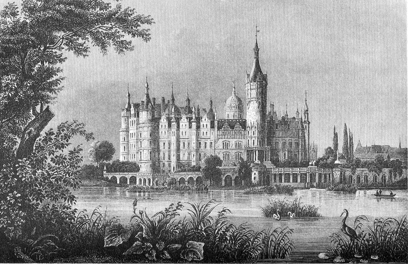 Historische Ansicht des Schlosses in Schwerin, Mecklenburg-Vorpommern. Stahlstich.